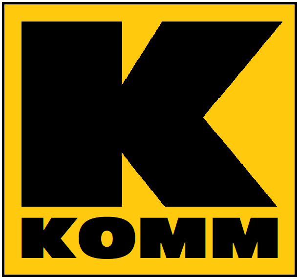 Logo von KOMM Supermarkt